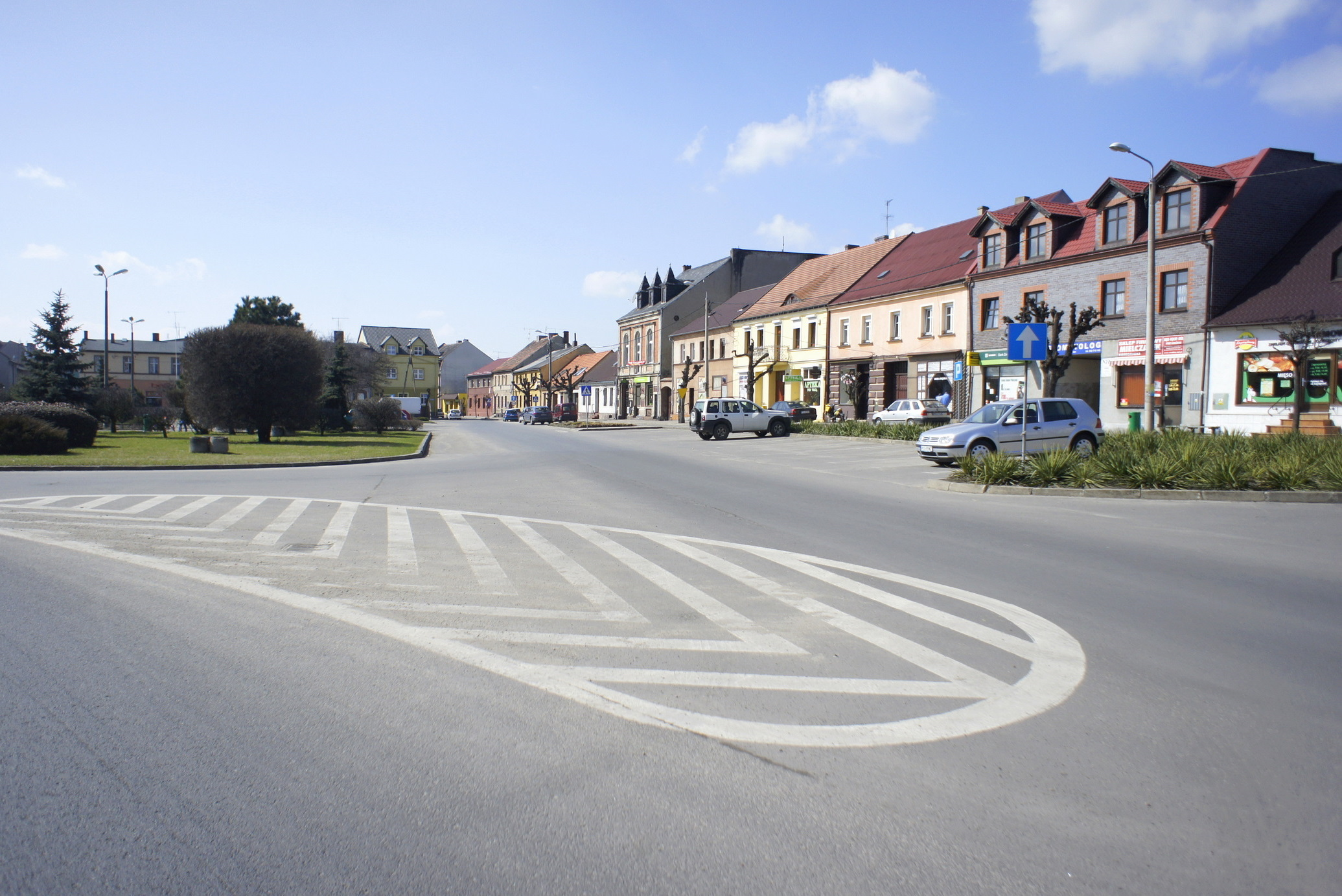 Wielkopolska. Czempiń, powiat kościański. Rynek, pierzeja północna.